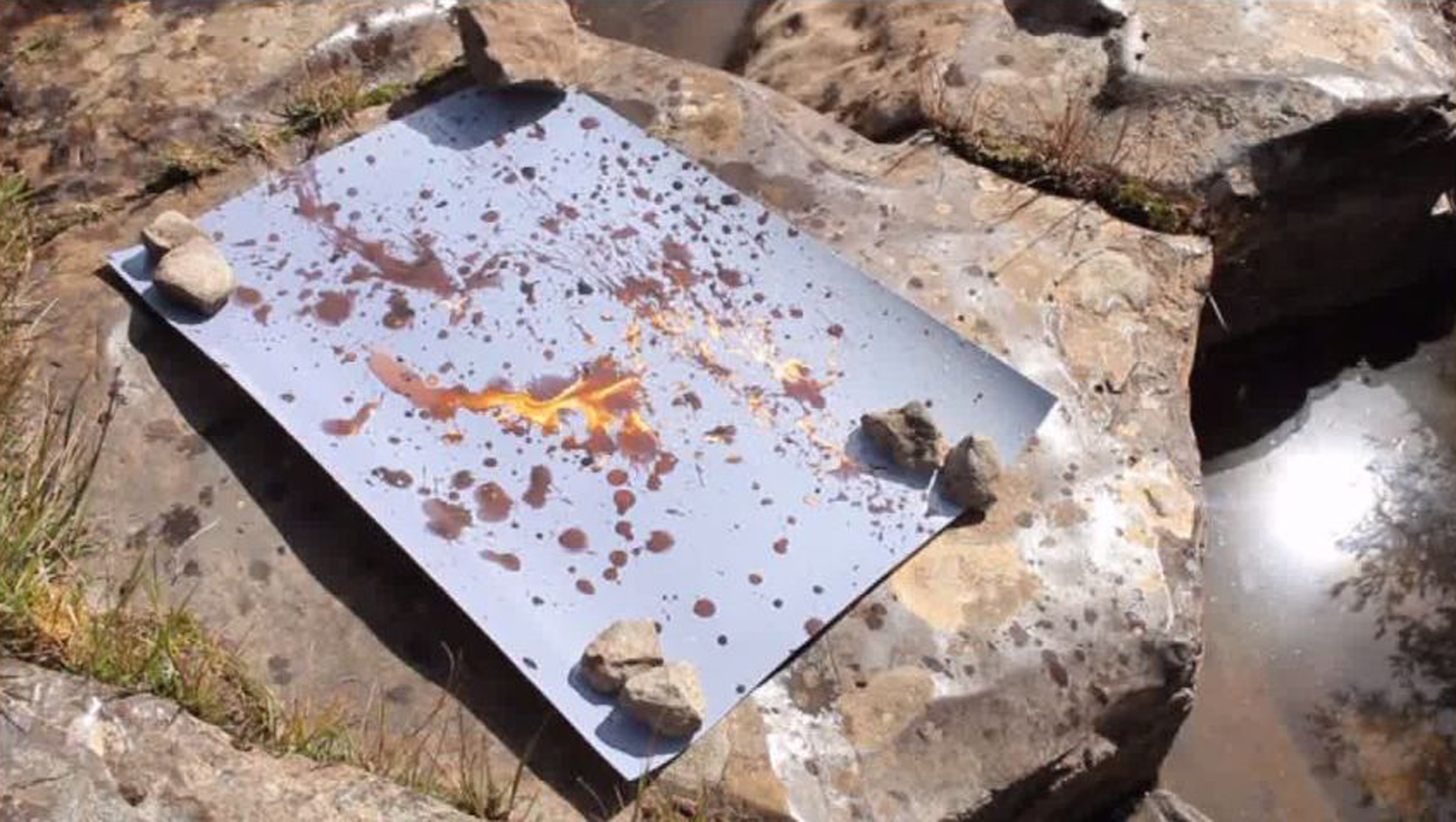 Argentype créé pour le film "les argentypes de Jean-Marie Fadier" (Prod: CNRS-ITEM, Réal : Monique et Pauline SICARD - 2012).